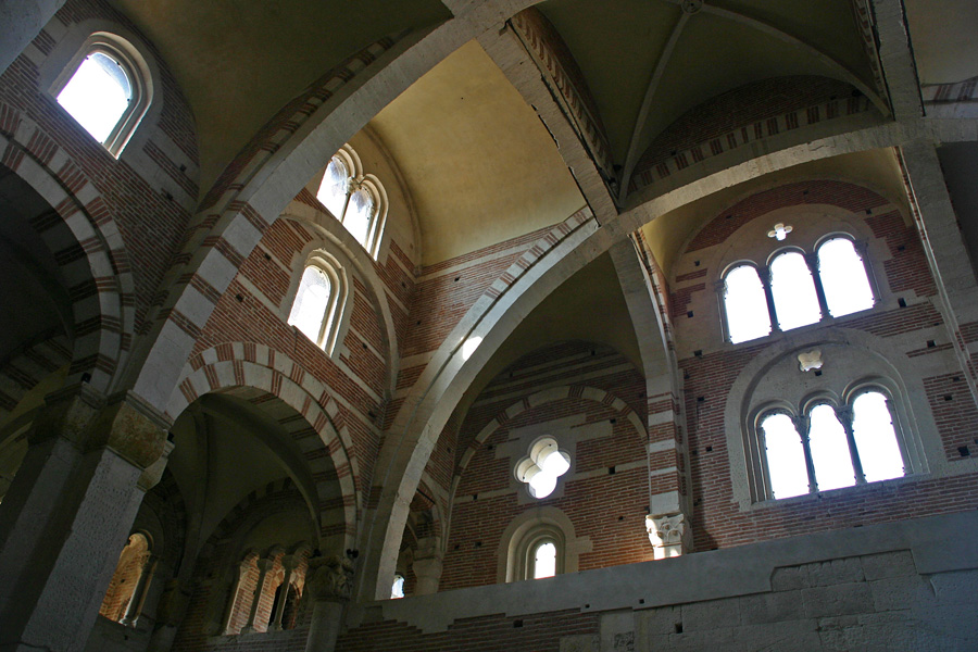 Volta del nartece del Duomo di Casale Monferrato